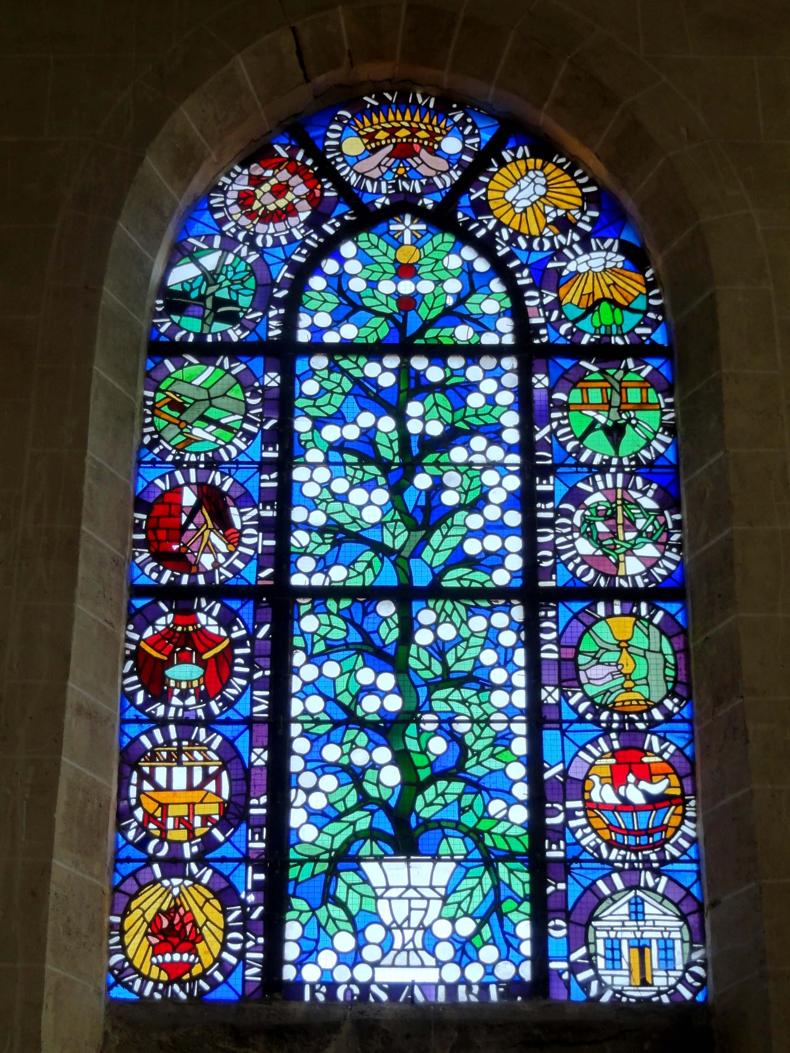 Verrière n° 7 (au nord du croisillon nord), dit vitrail du Rosaire, réalisée en 1851 par l'abbé Théodore-Cyrille Deligny (Francières 1808 - Compiègne 1887), curé de Jonquières de 1834 à 1861. Représentation, tympan : Couronnement de la Sainte-Vierge. Lancette de gauche, du haut vers le bas : Pentecôte, Pâcques, portement de Croix, Flagellation du Christ, Jésus au Temple, Noël, Incarnation. Lancette de droite, du haut vers le bas : Assomption, Ascension, Crucifixion, Sainte-Couronne, Agonie du Christ, Présentation, Visitation de Marie.